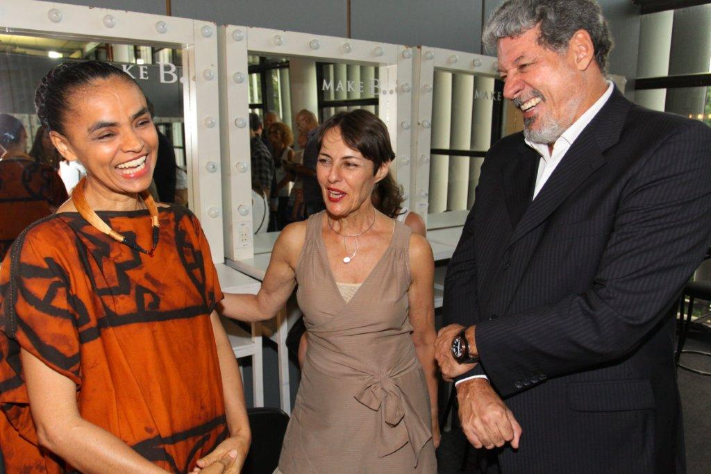 Ministra Ana de Hollanda participa da São Paulo Fashion Week. Foto: Marcos Fioravanti